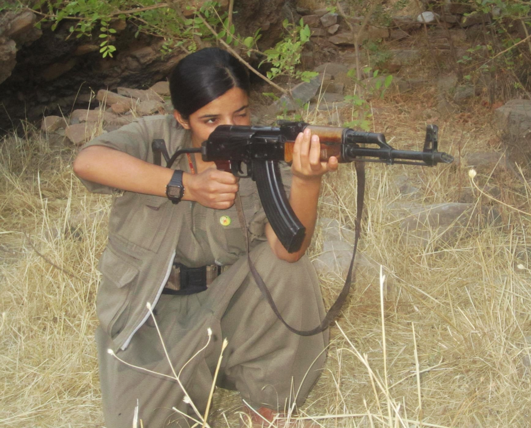 YPG